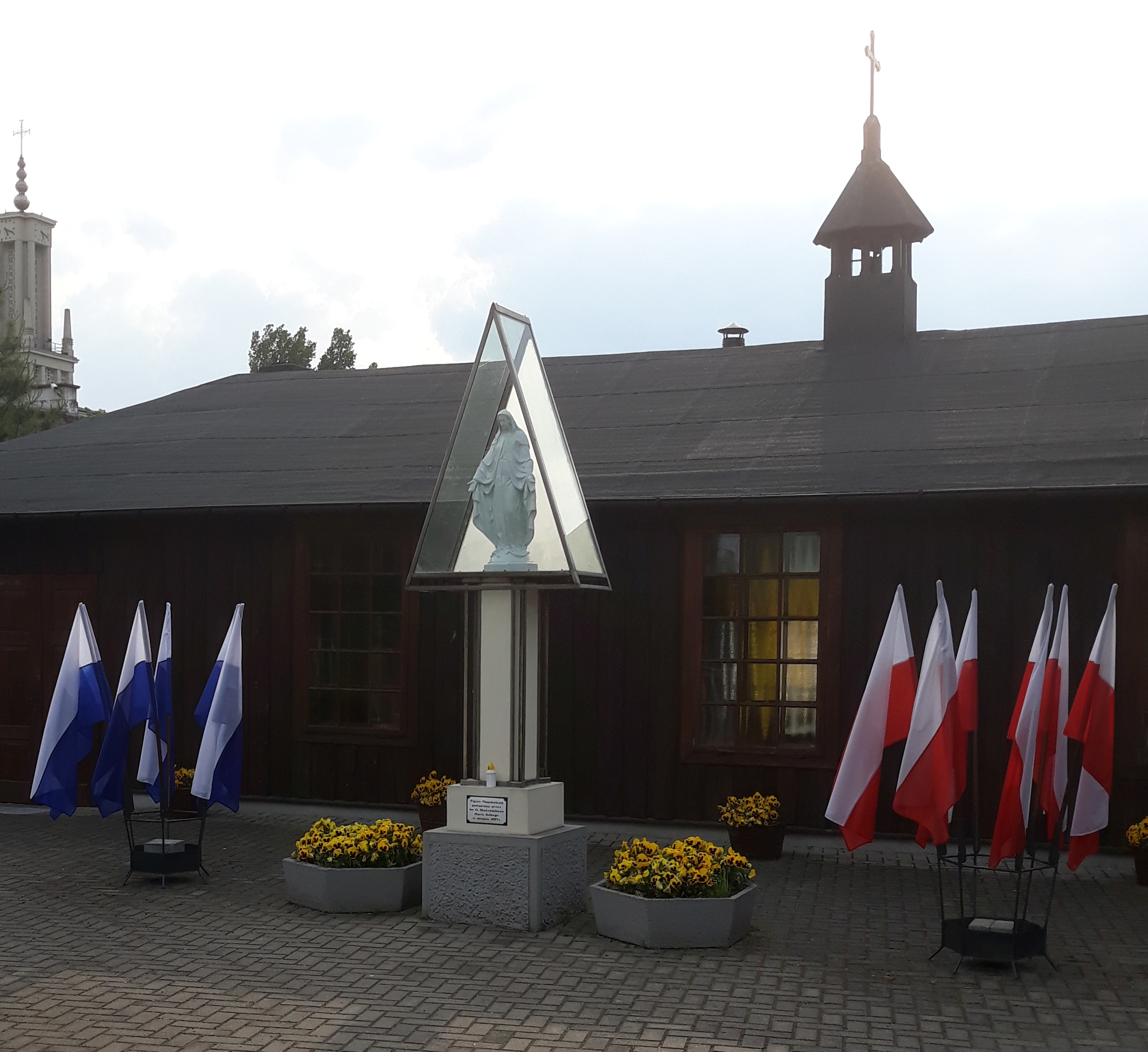 Paprotnia k. Sochaczewa. Niepokalanów